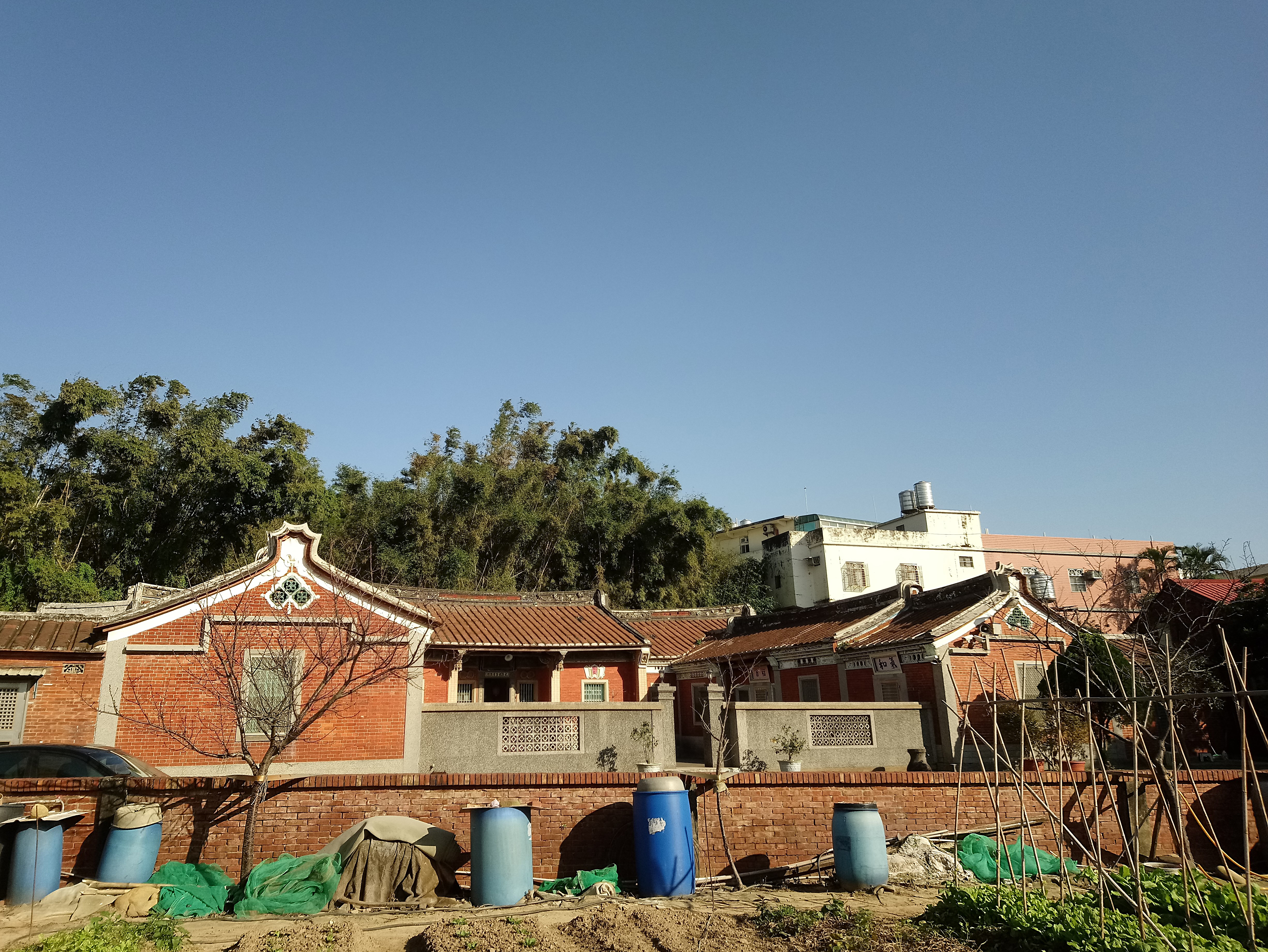 蘆竹室善居,桃園市蘆竹區南崁地區山鼻里